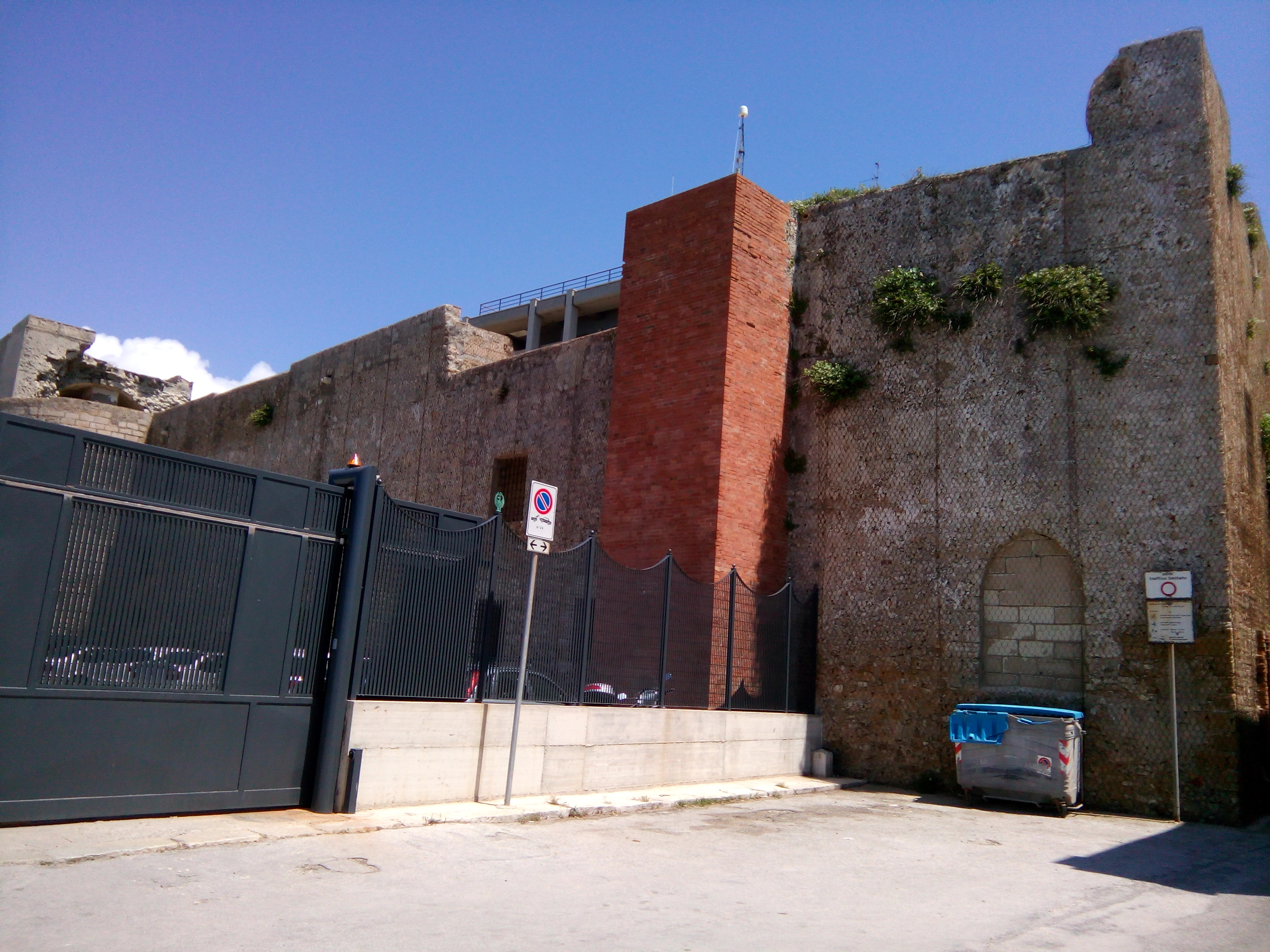 Castello di terra, Trapani, Sicily